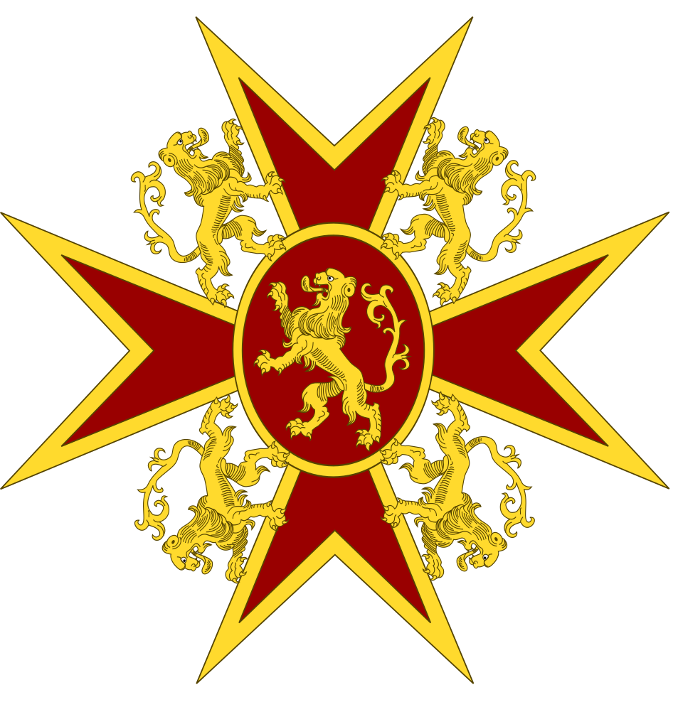 Insignie Královského řádu lva Godenu.